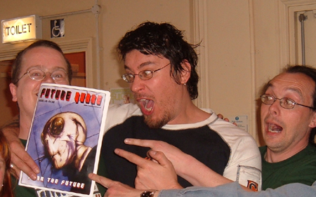 Foto del fumettista Simon Bisley alla 2005 Bristol Comics Expo.